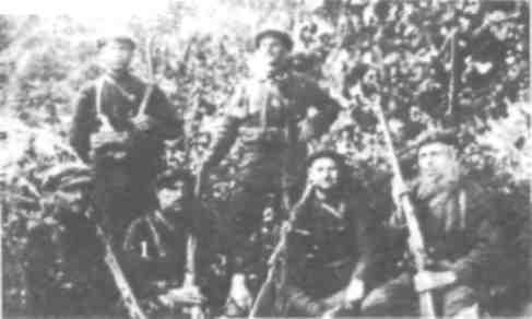 Gerasim Yanev